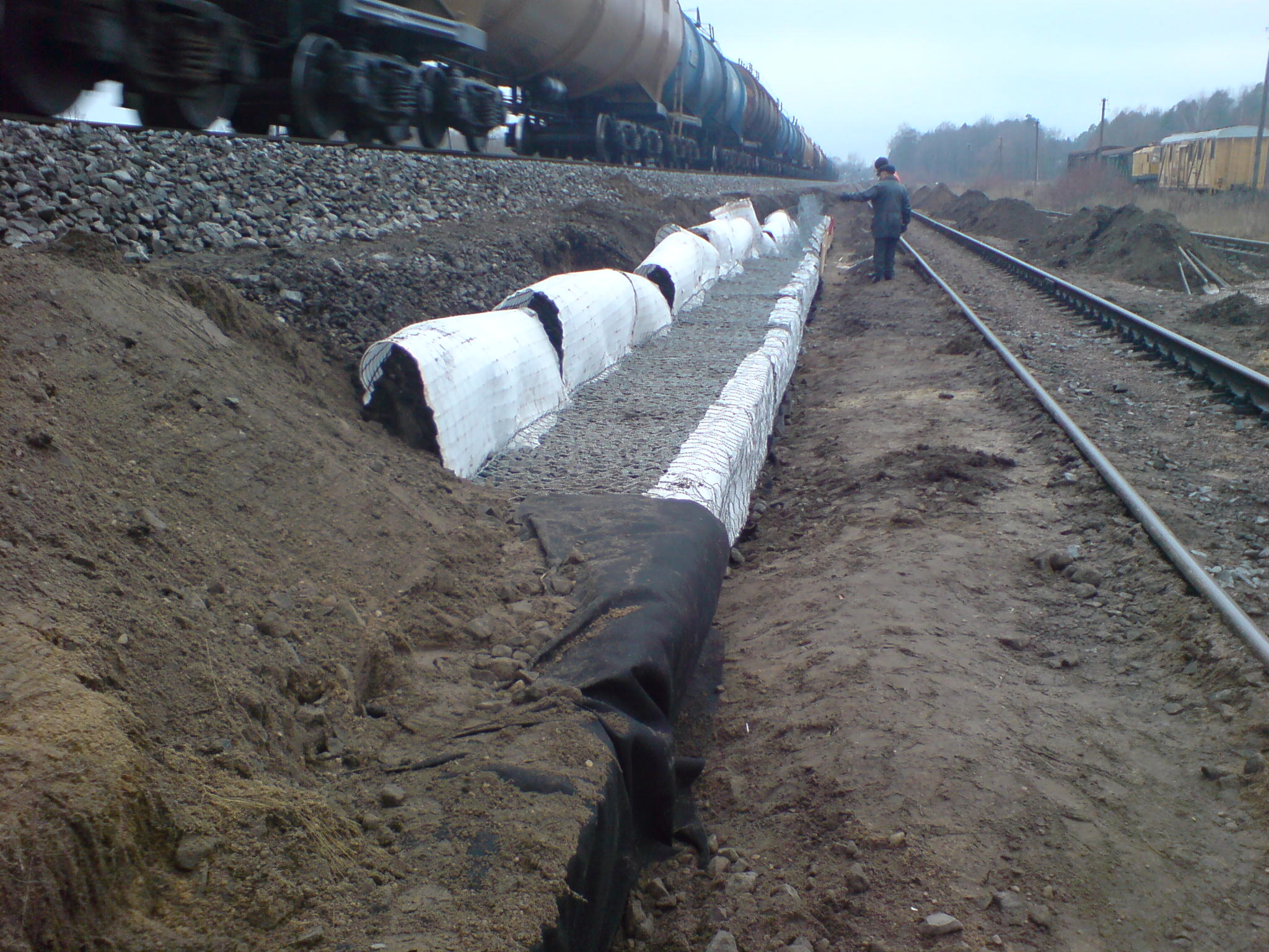 Dzelzceļa uzbēruma gabioni